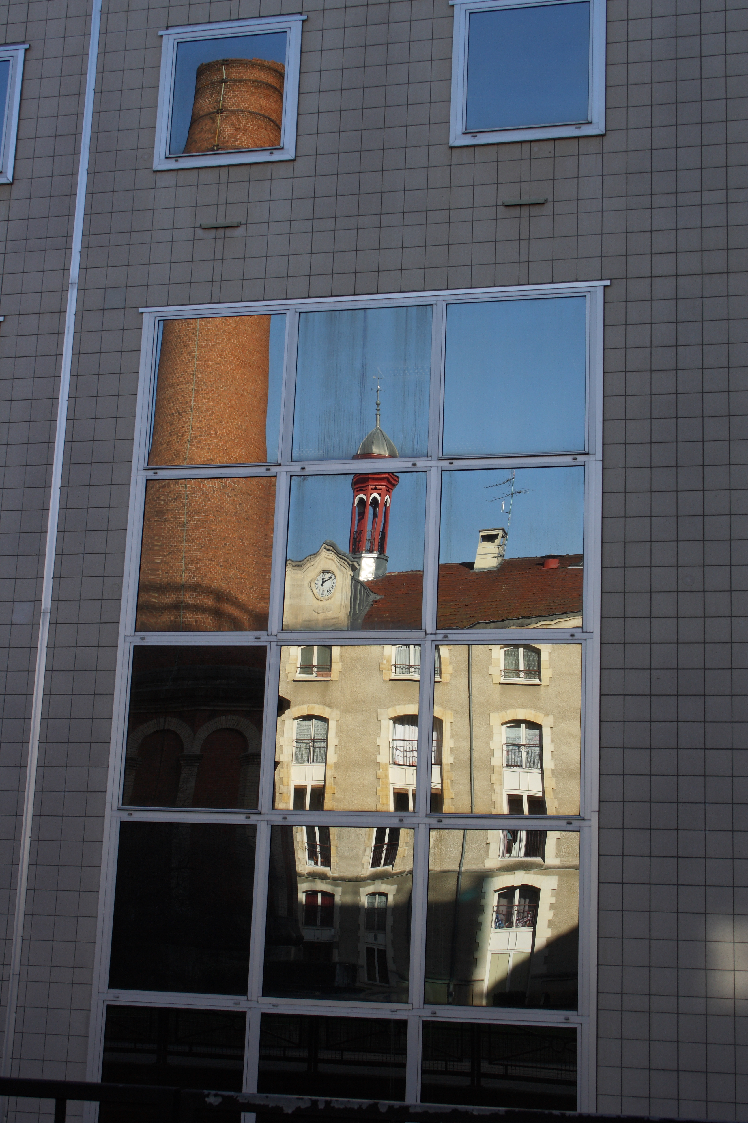 Ehemalige Tabakmanufaktur in Issy-les-Moulineaux im Département Hauts-de-Seine (Région Île-de-France), Rue Ernest Renan N° 17; Spiegelung